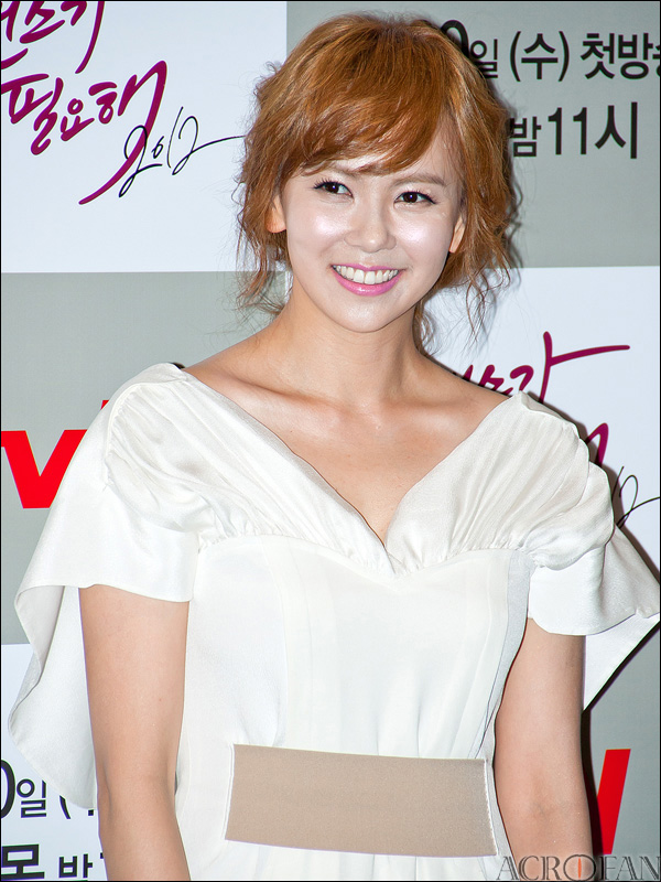 tvN 드라마 로맨스가 필요해 2012의 제작 발표회에 참석한 김지우